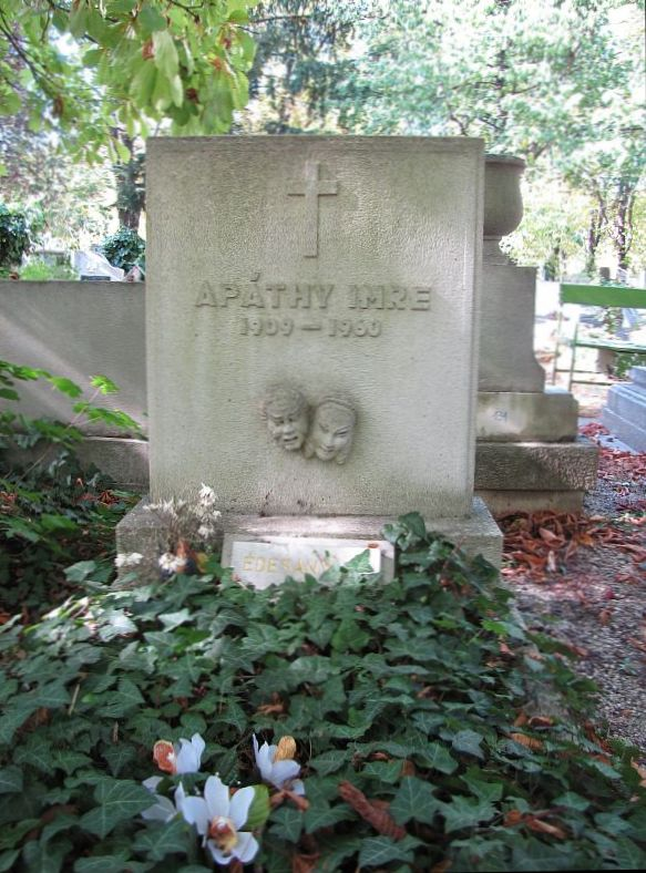 Apáthy Imre (Ausim Imre) (Budapest, 1909. május 28. - Budapest, 1960. február 22.) színész, rendező sírja Budapesten. Farkasréti temető: 41-1-161